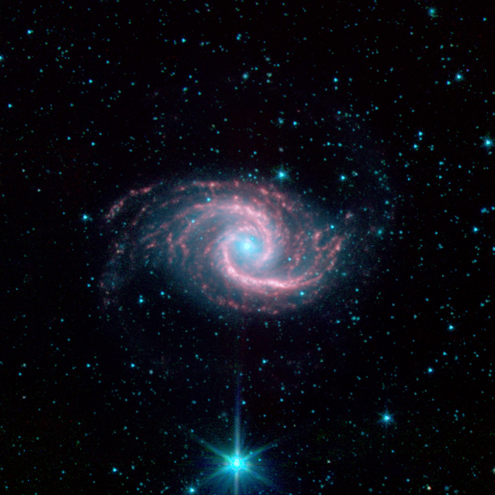 NGC 1566